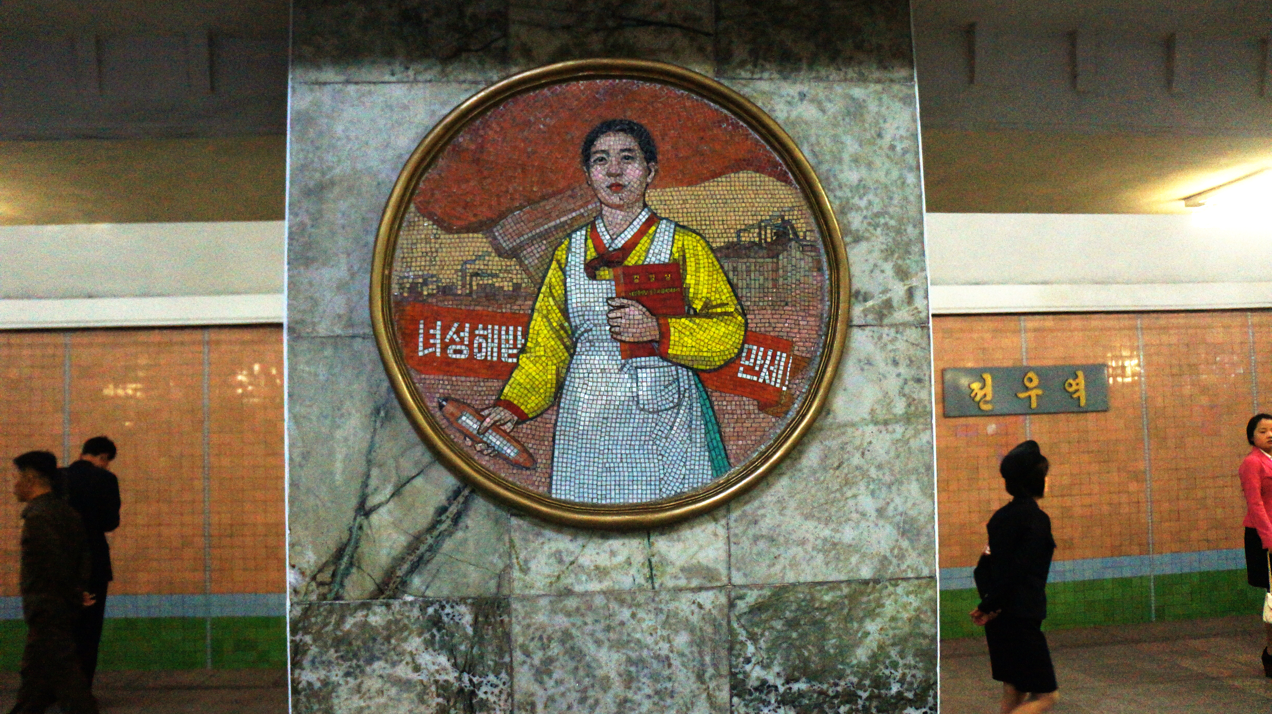 Pyongyang Metro Tour